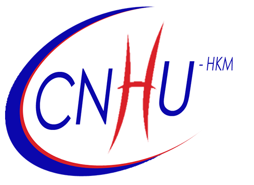 Logo du CNHU-HKM